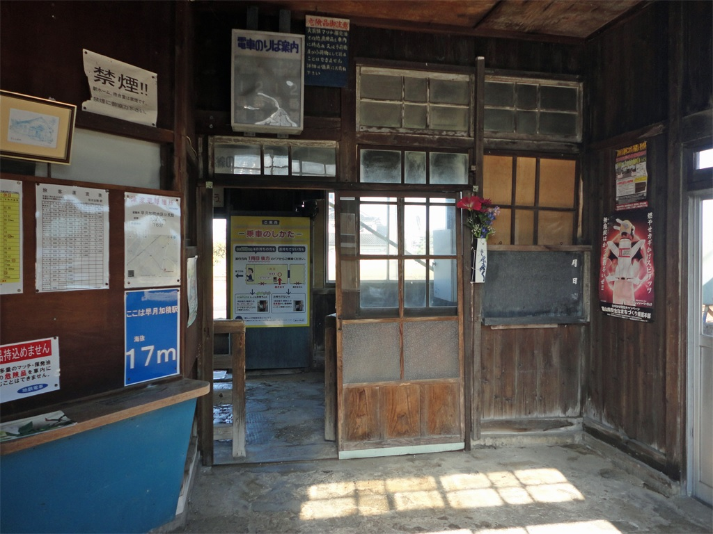 富山地方鉄道本線早月加積駅駅舎内